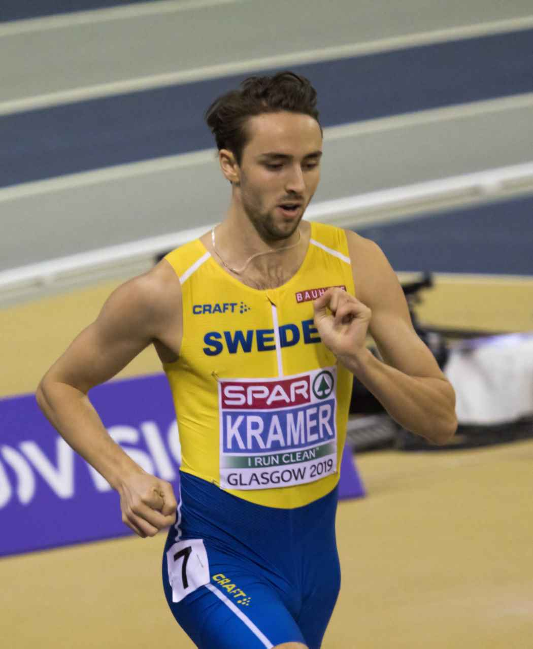 EKI30362 finale 800m man kramer